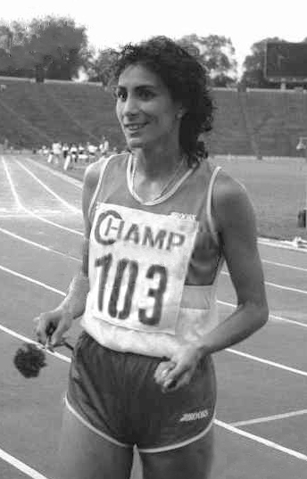 Ella Kovacs in Bucharest